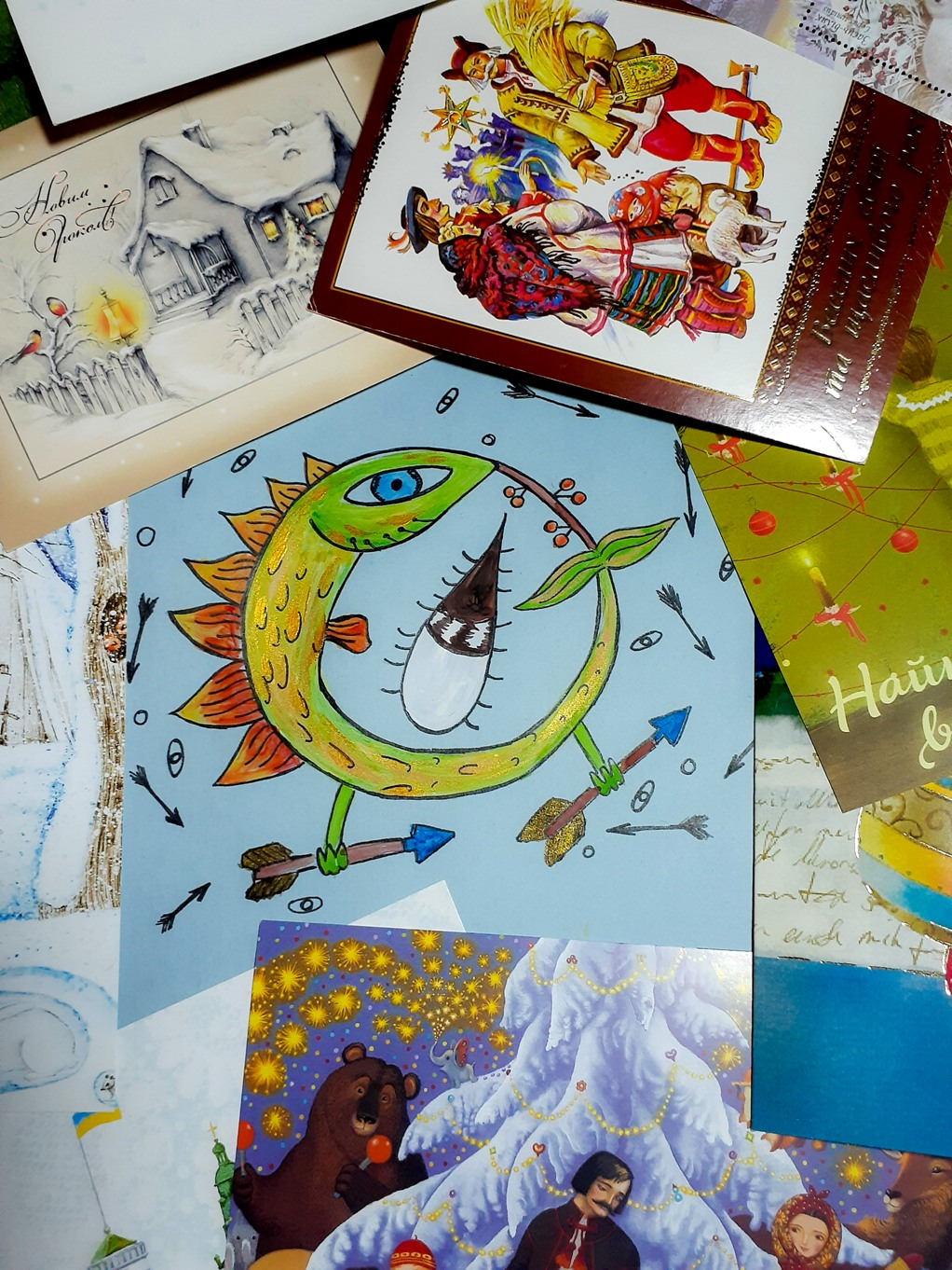 Світлина на якій зображені українські листівки та картки присвячені циклу зимових свят